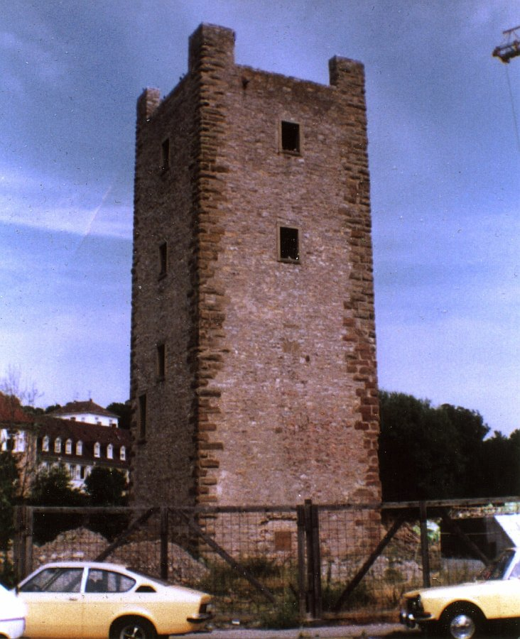 Burg Bruchsal, Bergfried (1983)